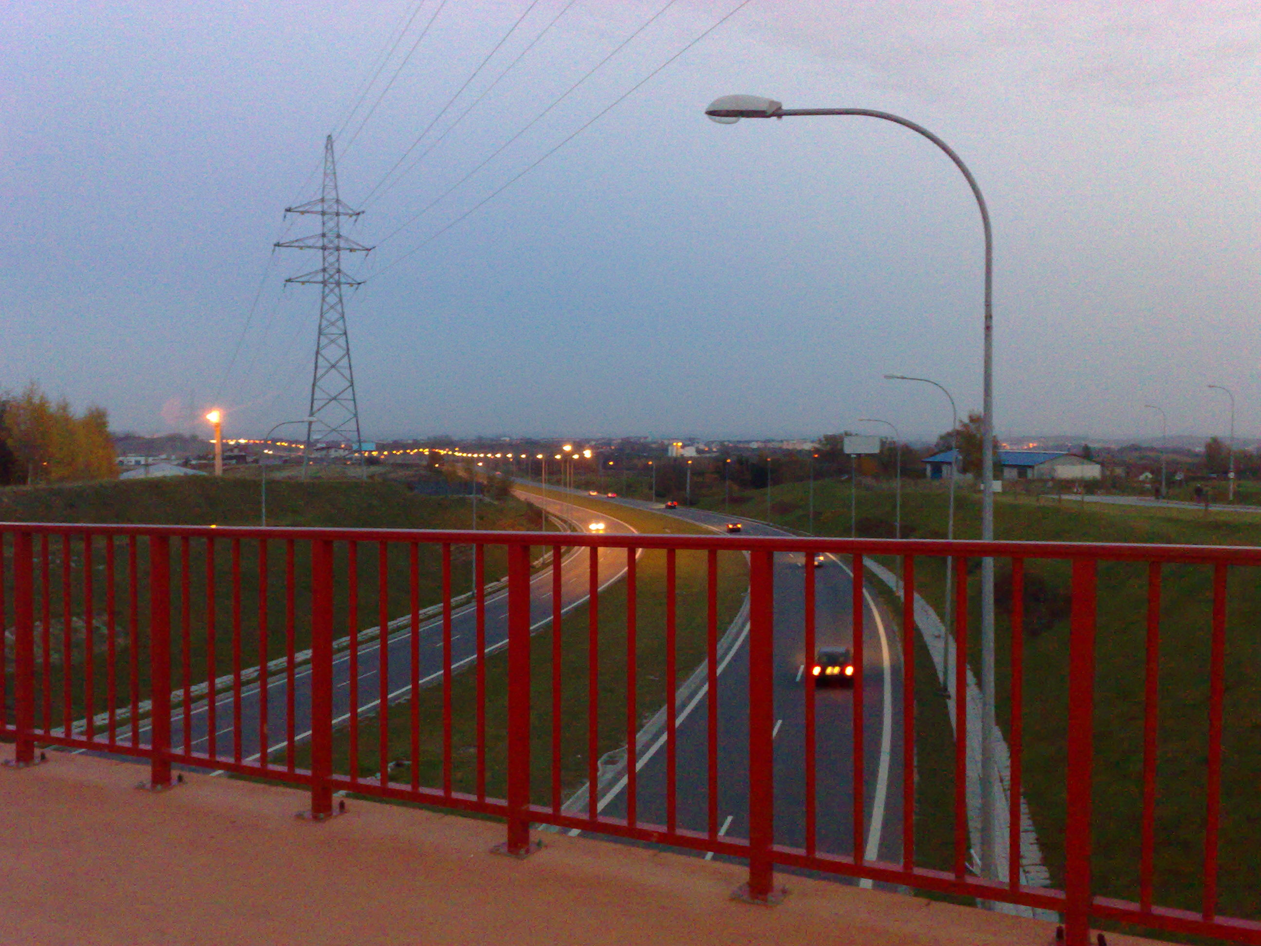 Trasa W-Z w Gdańsku, okolice Jasienia, skrzyżowanie dwupoziomowe z ul. Leszczynową. Widok w kierunku centrum miasta.